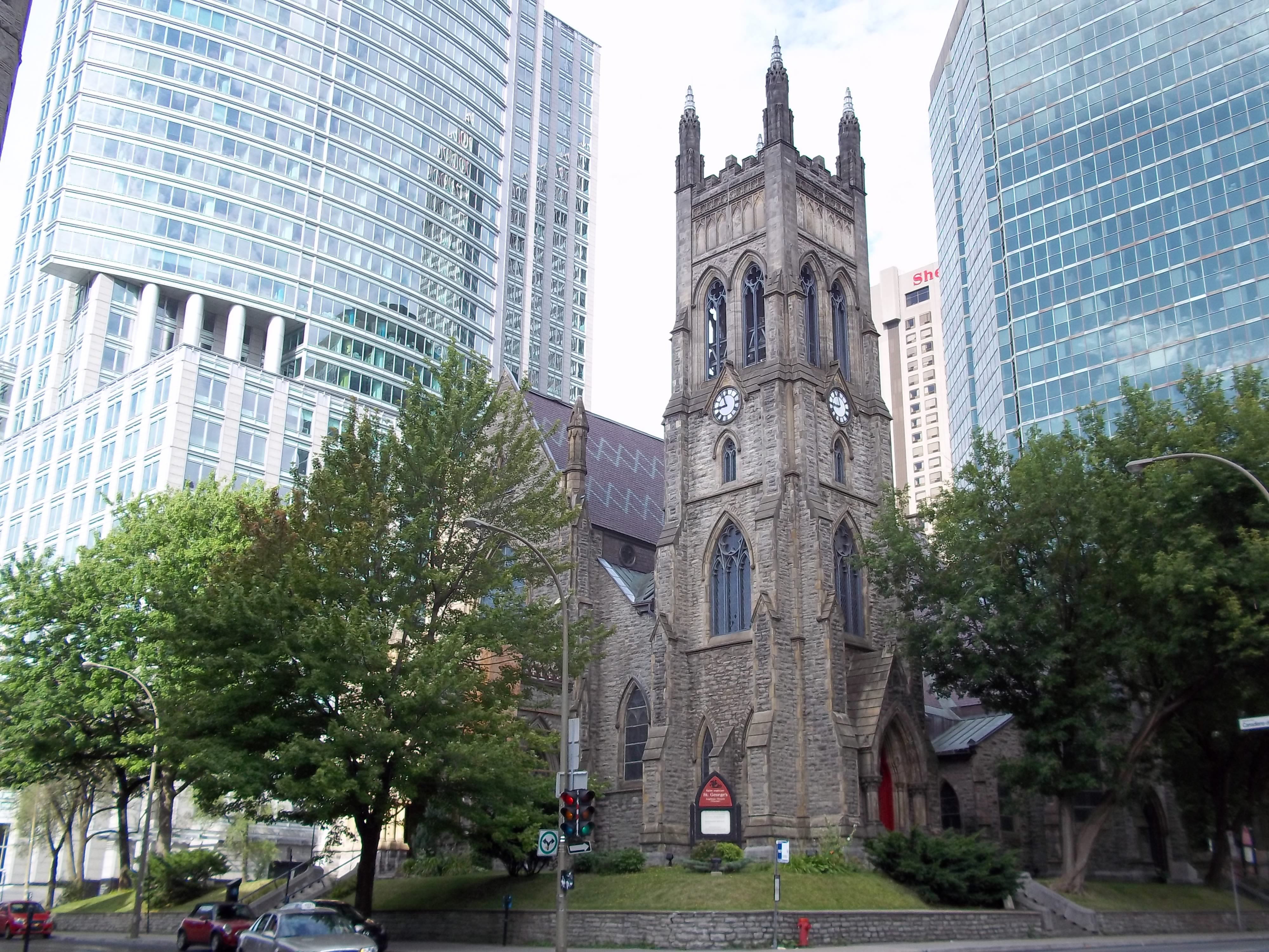 L'église anglicane Saint-Georges à Montréal